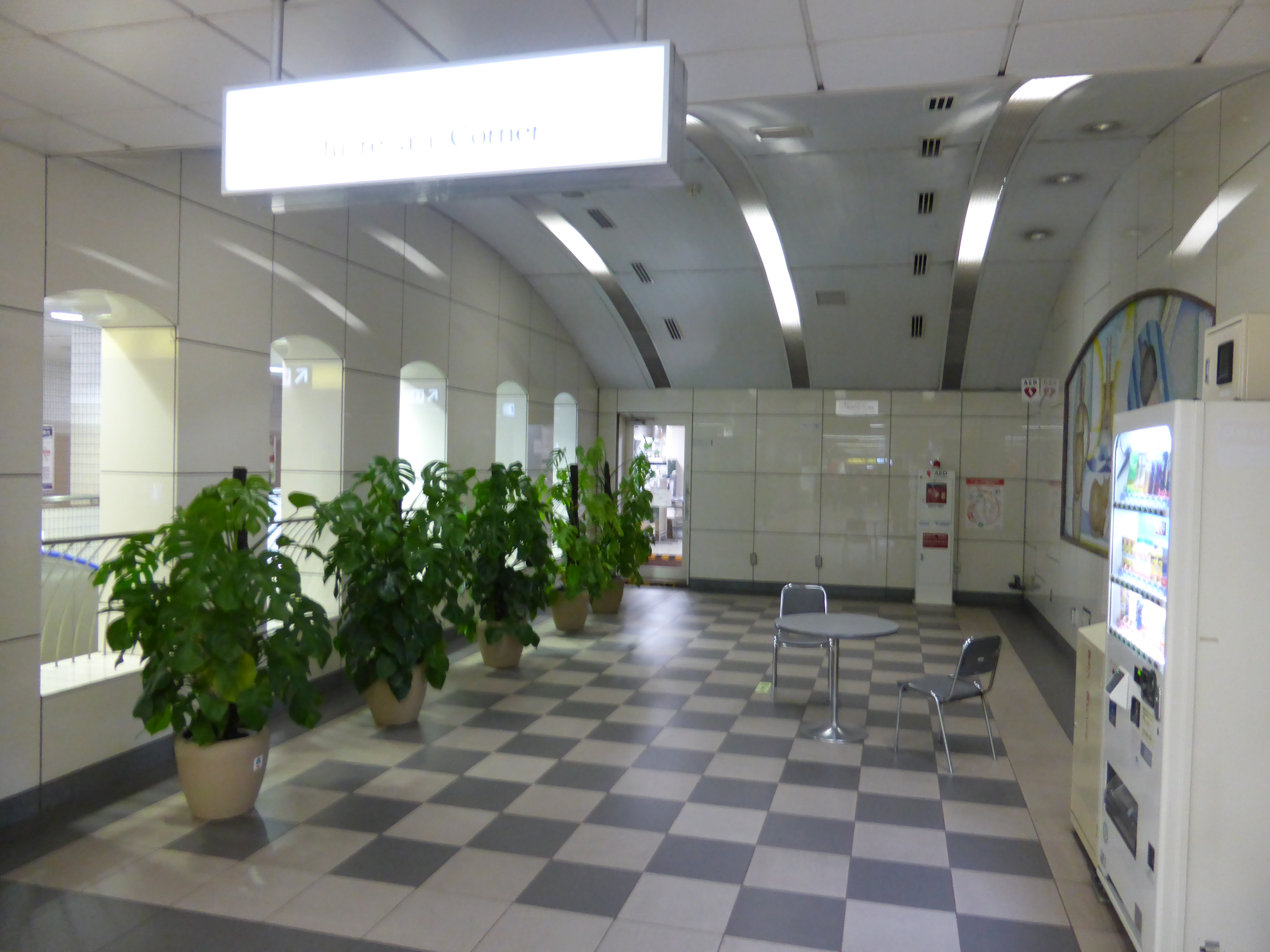 東京メトロ南北線 東大前駅 ふれあいコーナー